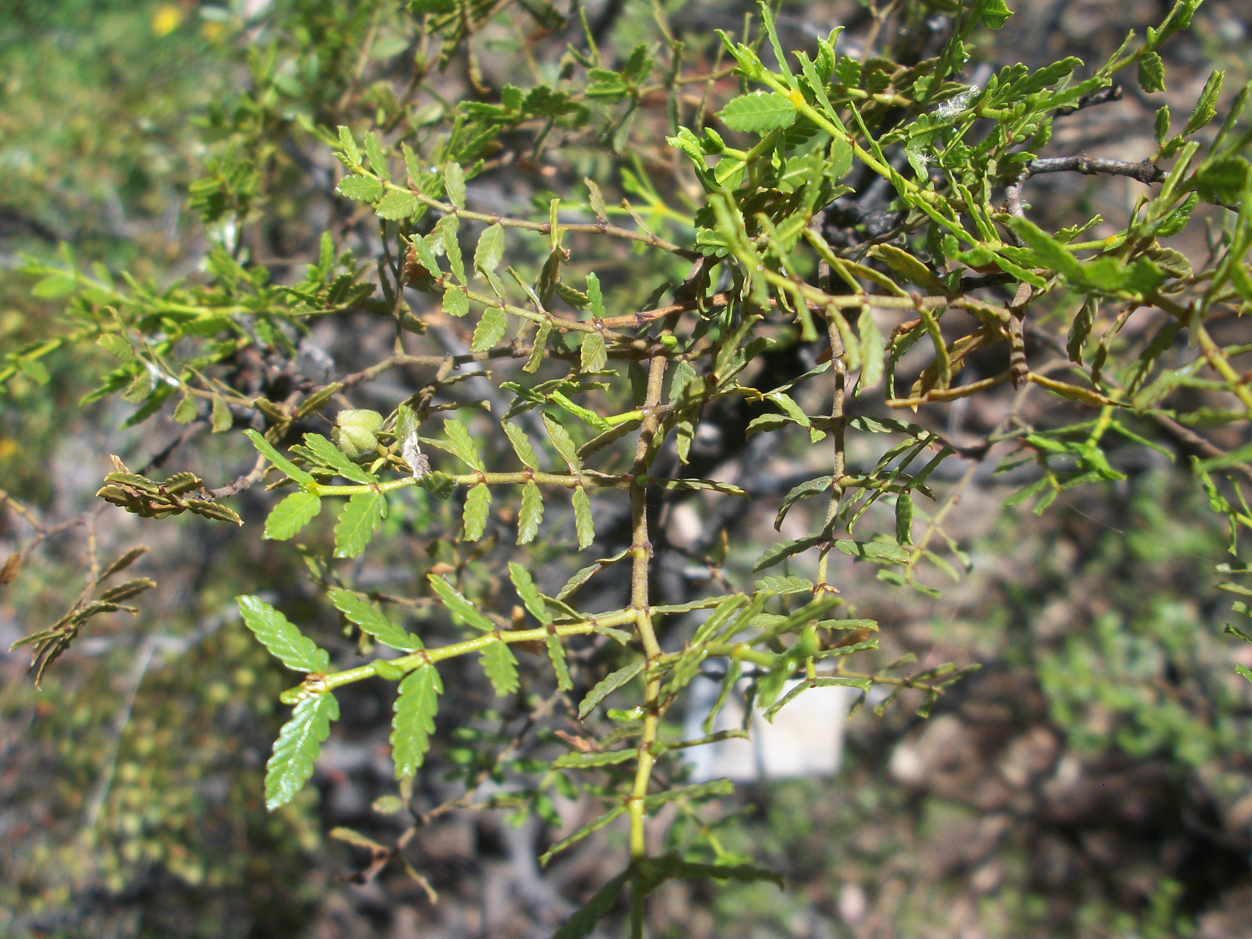 Detalle de rama y hojas de Larrea nitida, en Mendoza, Argentina.